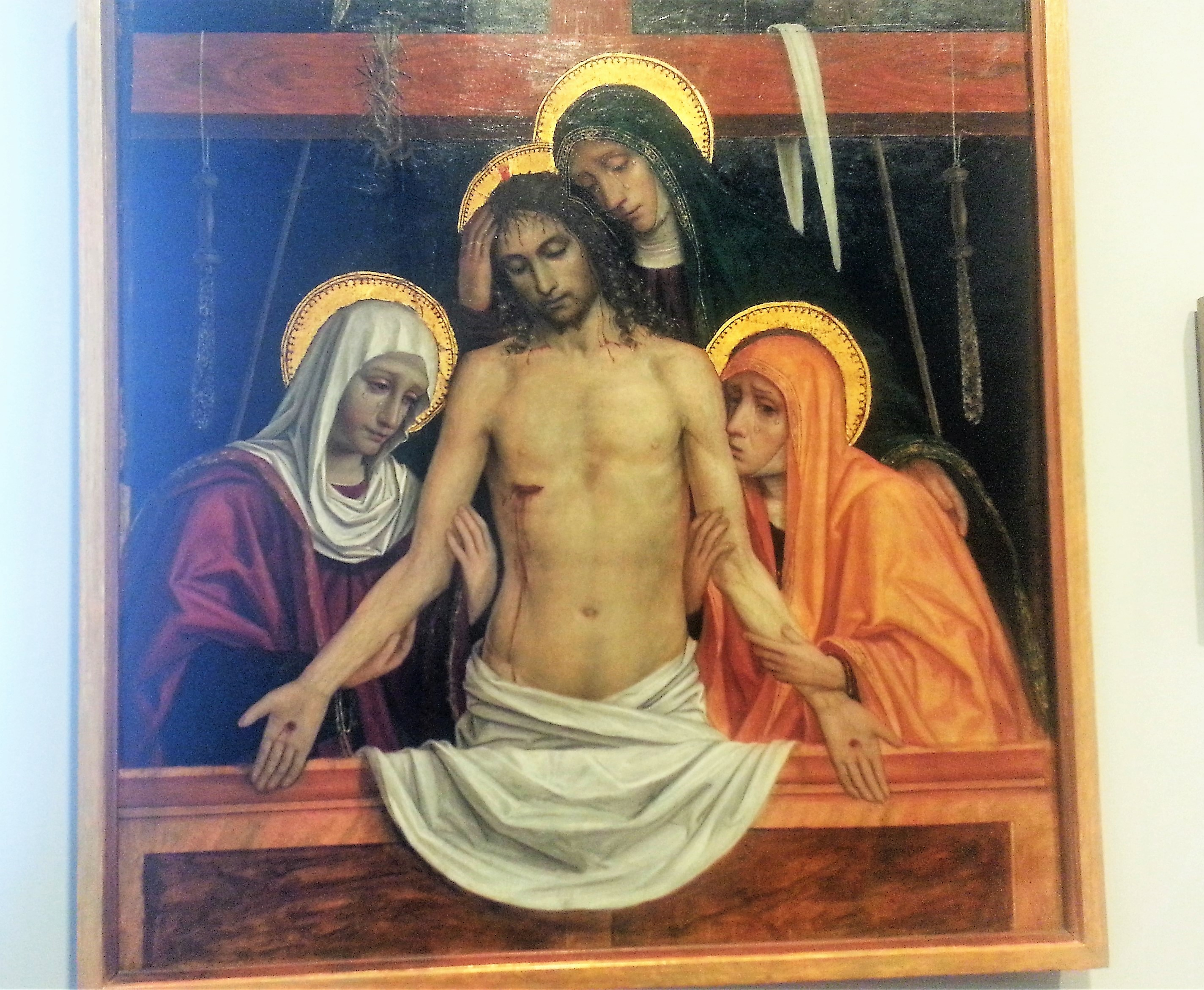 Cristo in pietà sorretto dalle dotte, parte del polittico di Ambrogio da Fossano originariamente della chiesa di Santo Stefano